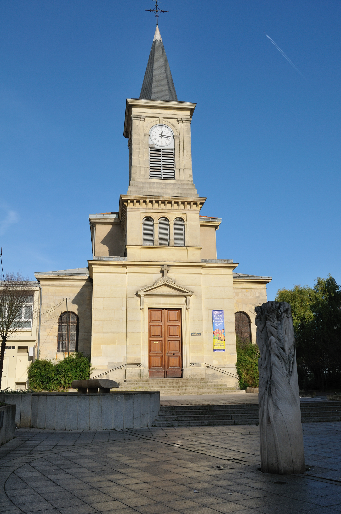 Église Saint-Pierre-et-Saint-Paul, Fontenay-aux-Roses, Hauts-de-Seine, France